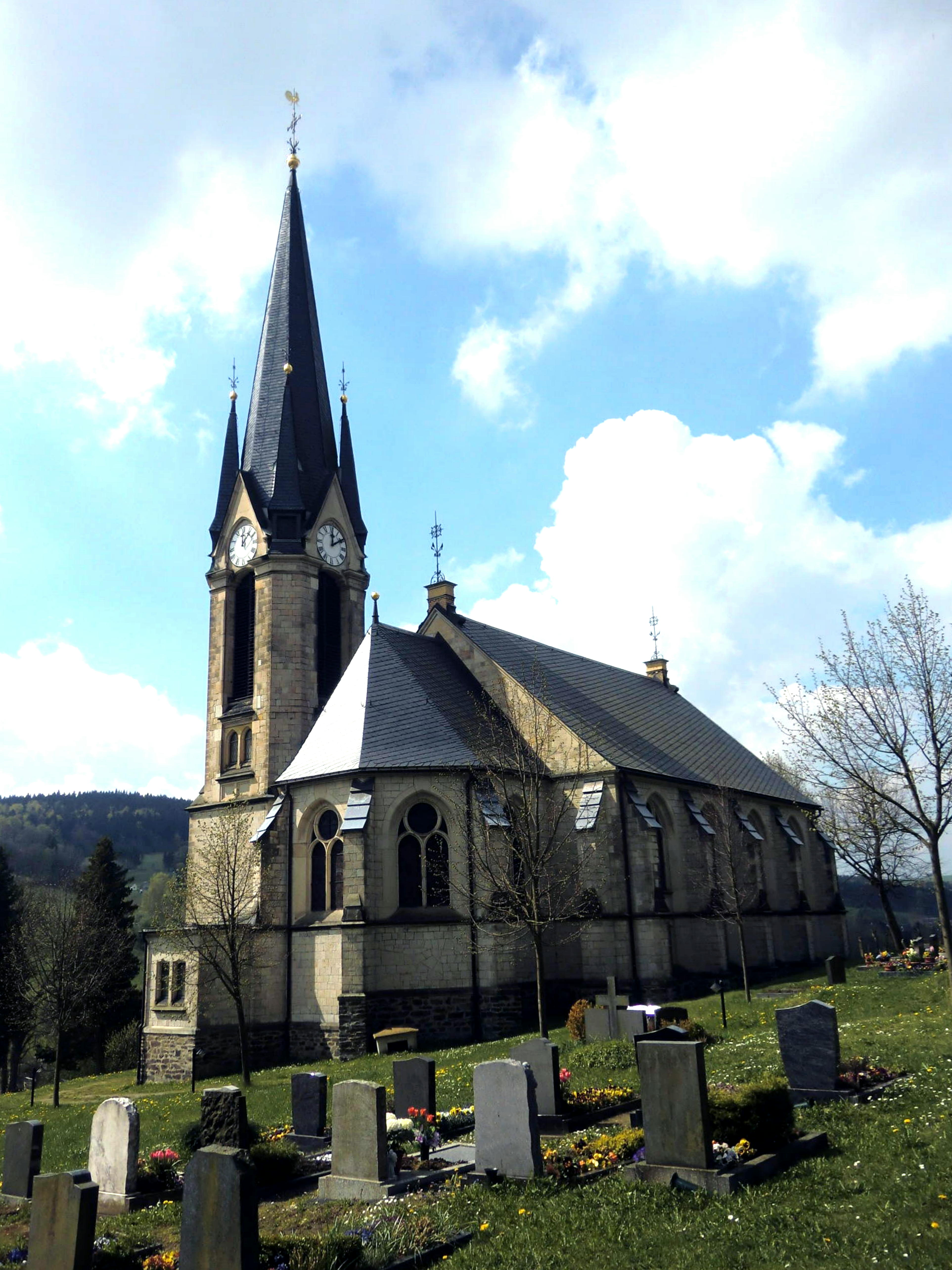 evangelische Kirche in Rechenberg, Osterzgebirge, Sachsen; erbaut 1899-1901 nach Entwurf des Architekten Theodor Quentin im Stil der Neugotik